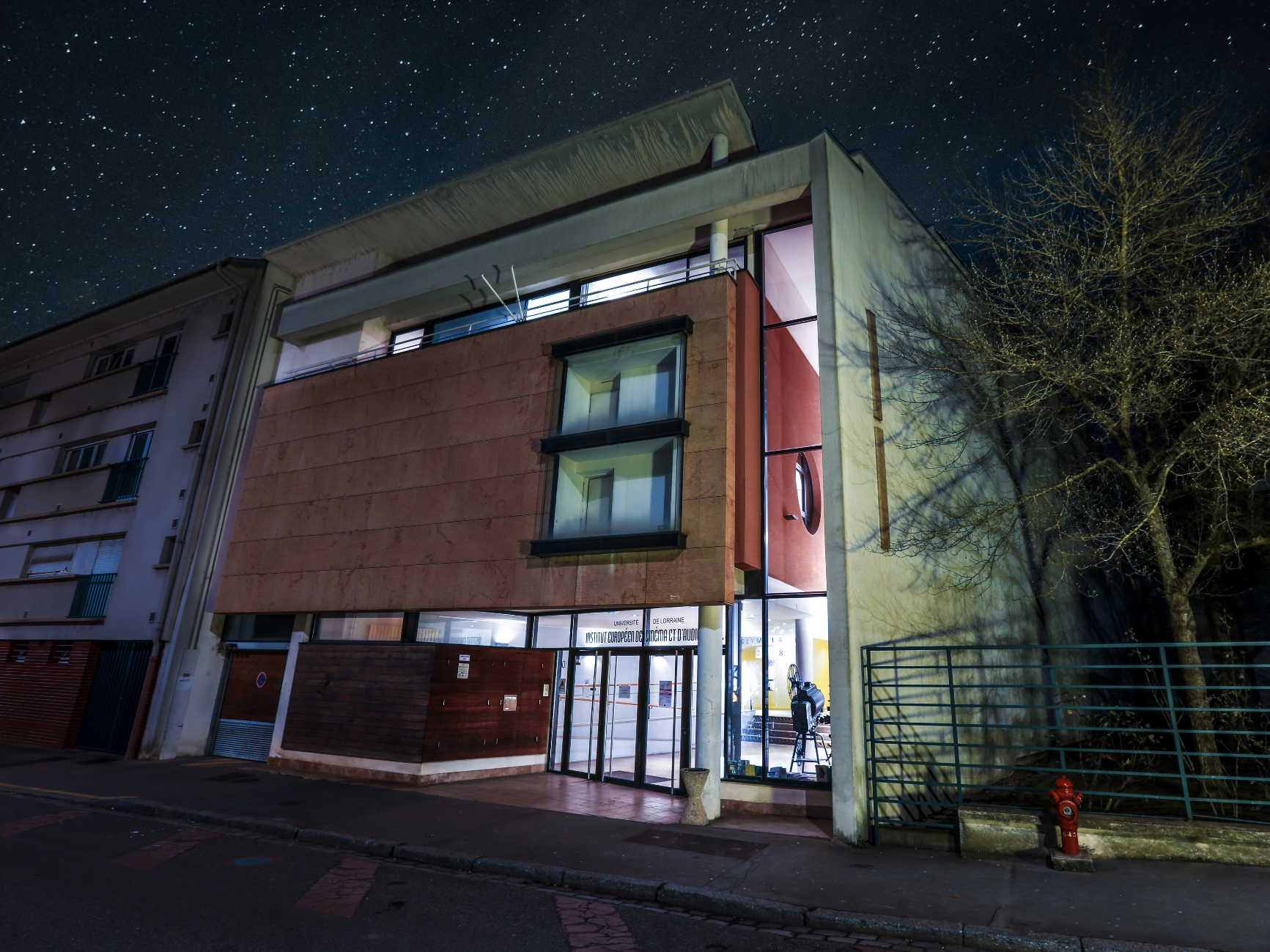 La façade de l'IECA, rue Michel Ney